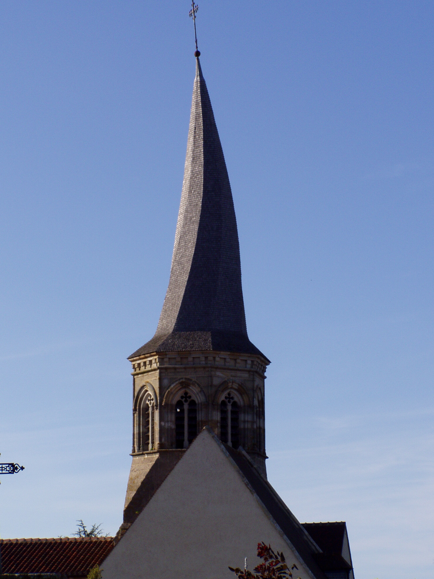 le clocher tors de l'église de Saint-Bonnet-de-Four dans l'Allier (France)